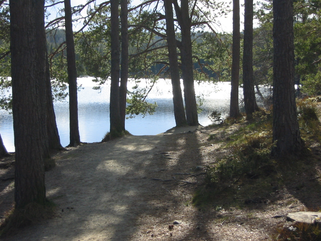 Baklidammen lake in Bymarka, Trondheim, April 30 2005.